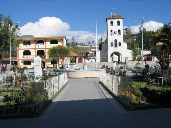 plaza de chiquian